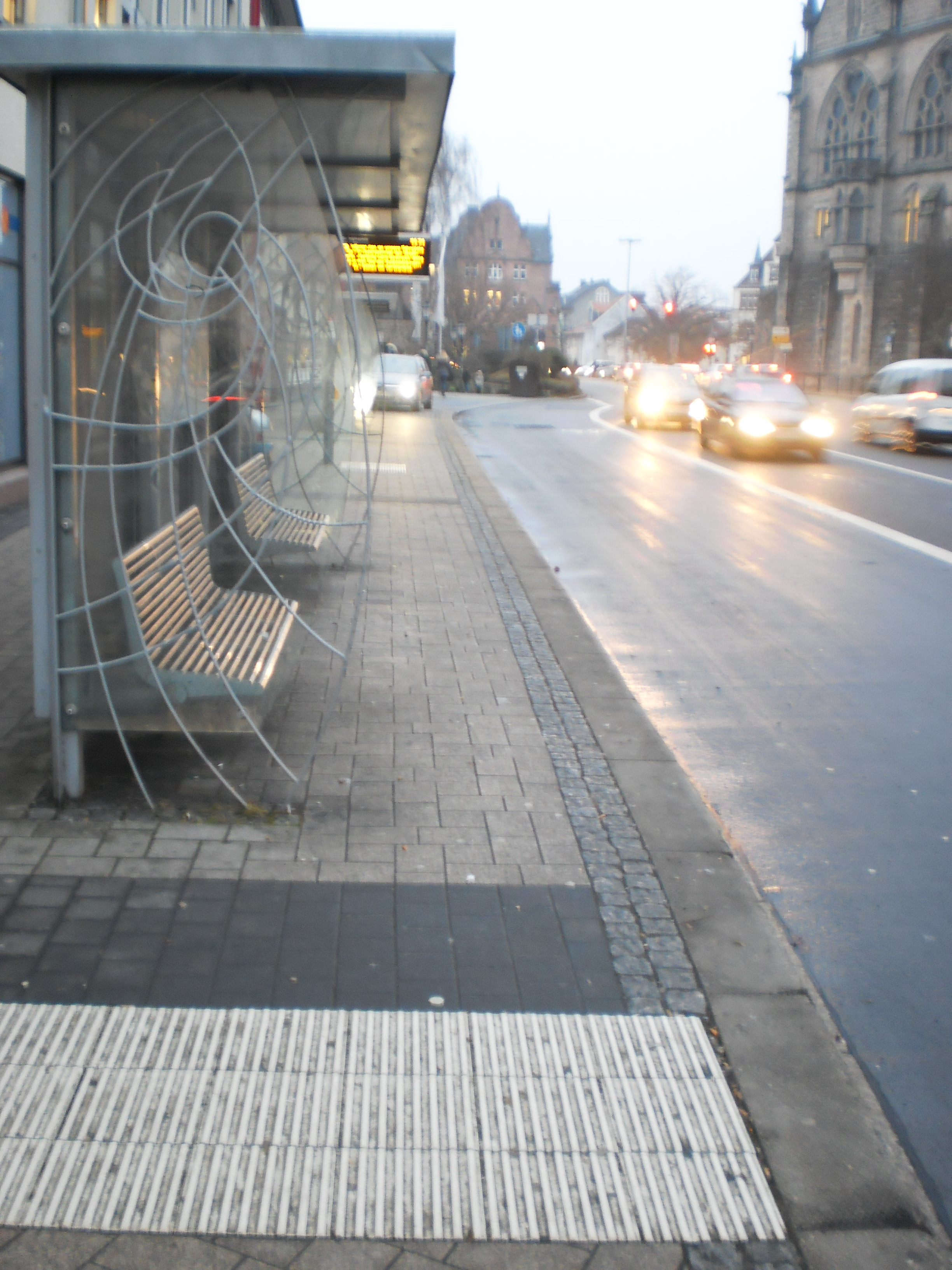 Leere Bushaltestelle am Rudolphsplatz zum Busfahrerstreik in Marburg (Hessen). Heute nur wenige Fahrgäste - die Busse der Überlandlinien fuhren. Autoverkehr auf der Strasse unterhalb der Alten Universität in Richtung Biegenstraße, 2017-01-09.